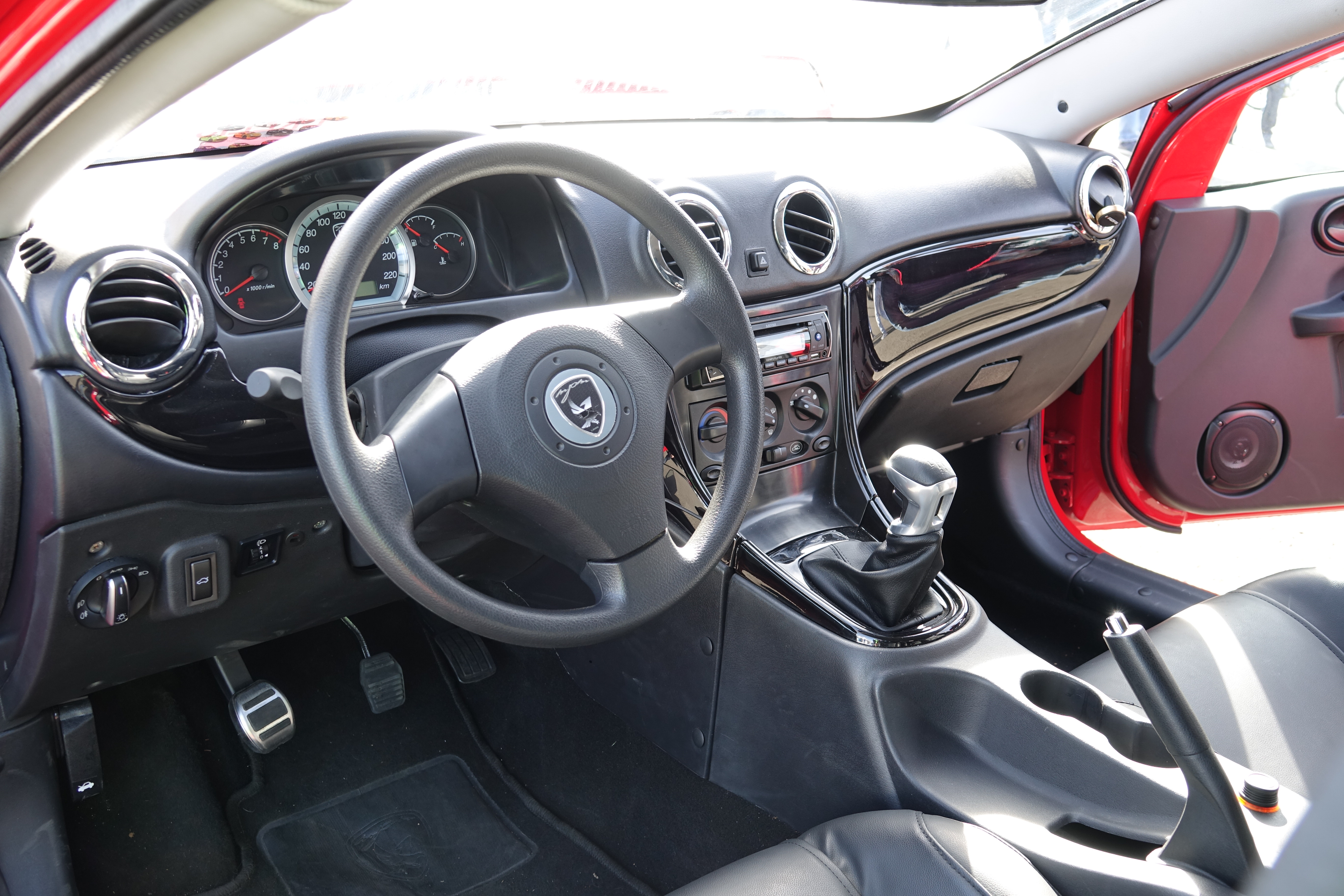 MPM Erelis aux Grandes Heures Automobiles 2018